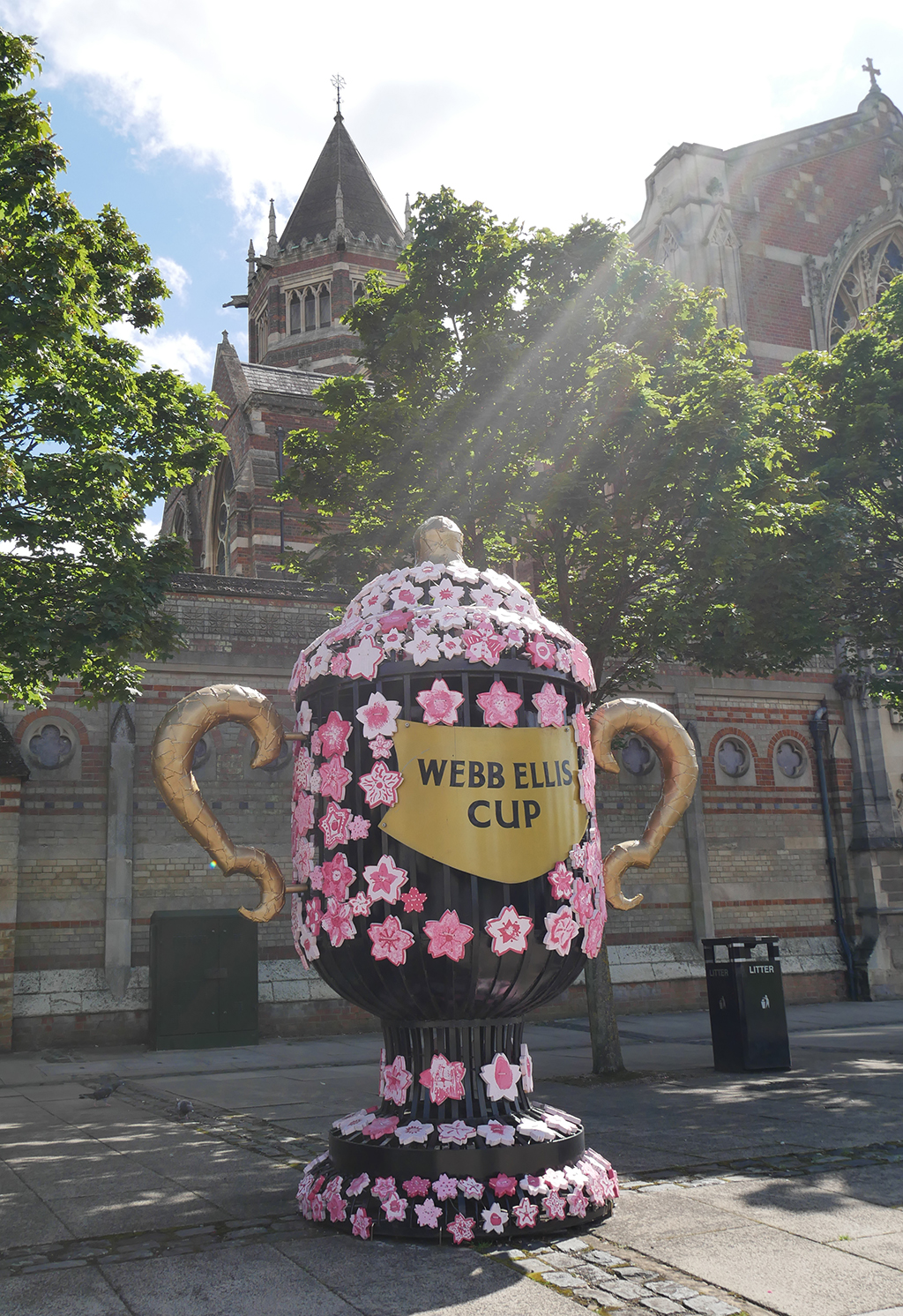 ラグビー校の前に立つウェブエリスカップ